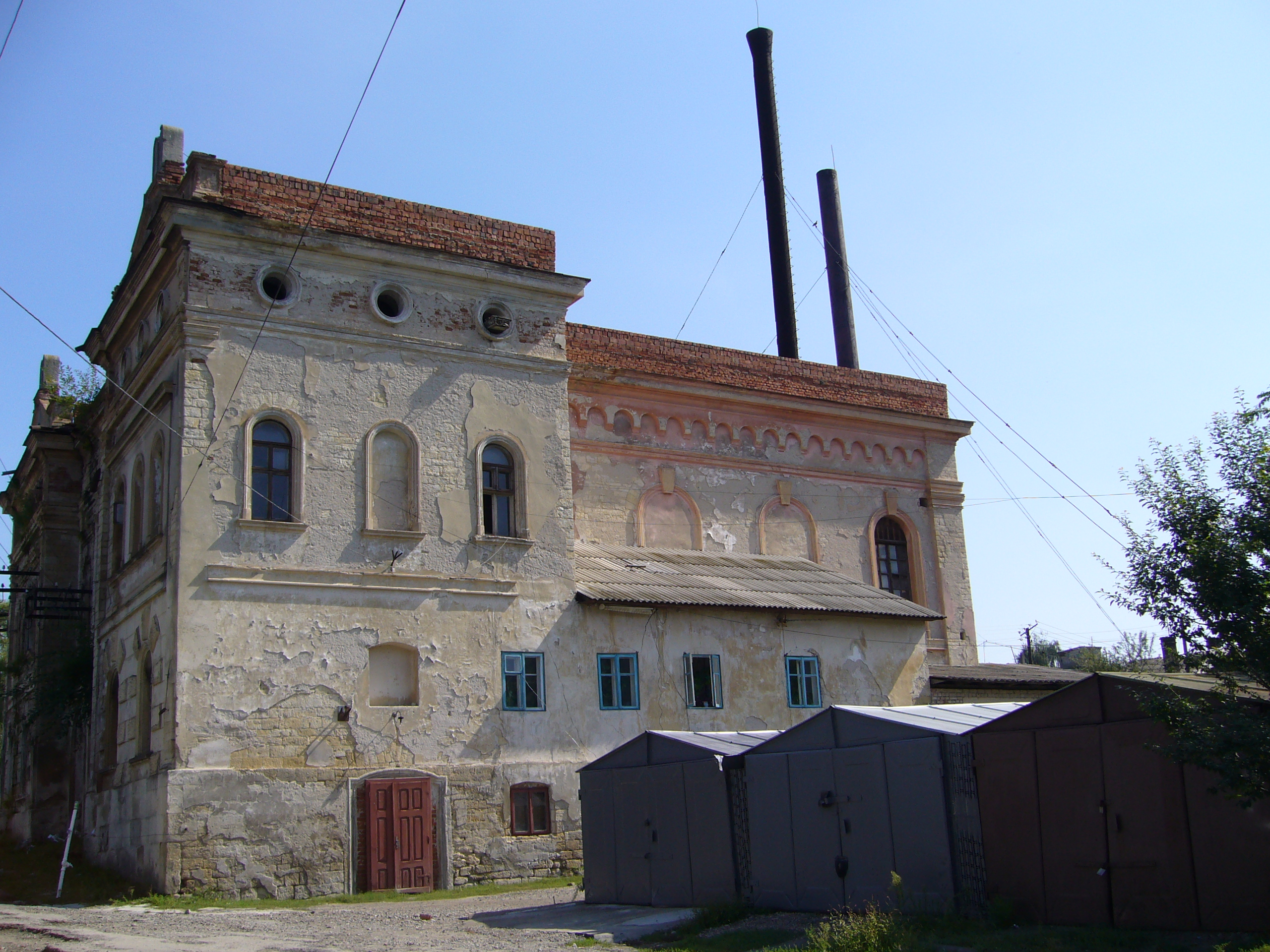 former synagogue in Залещики